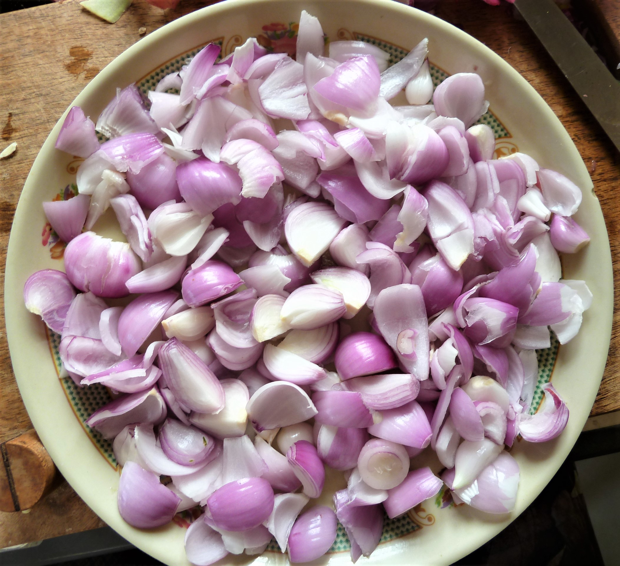 ఉల్లిపాయ ముక్కలు